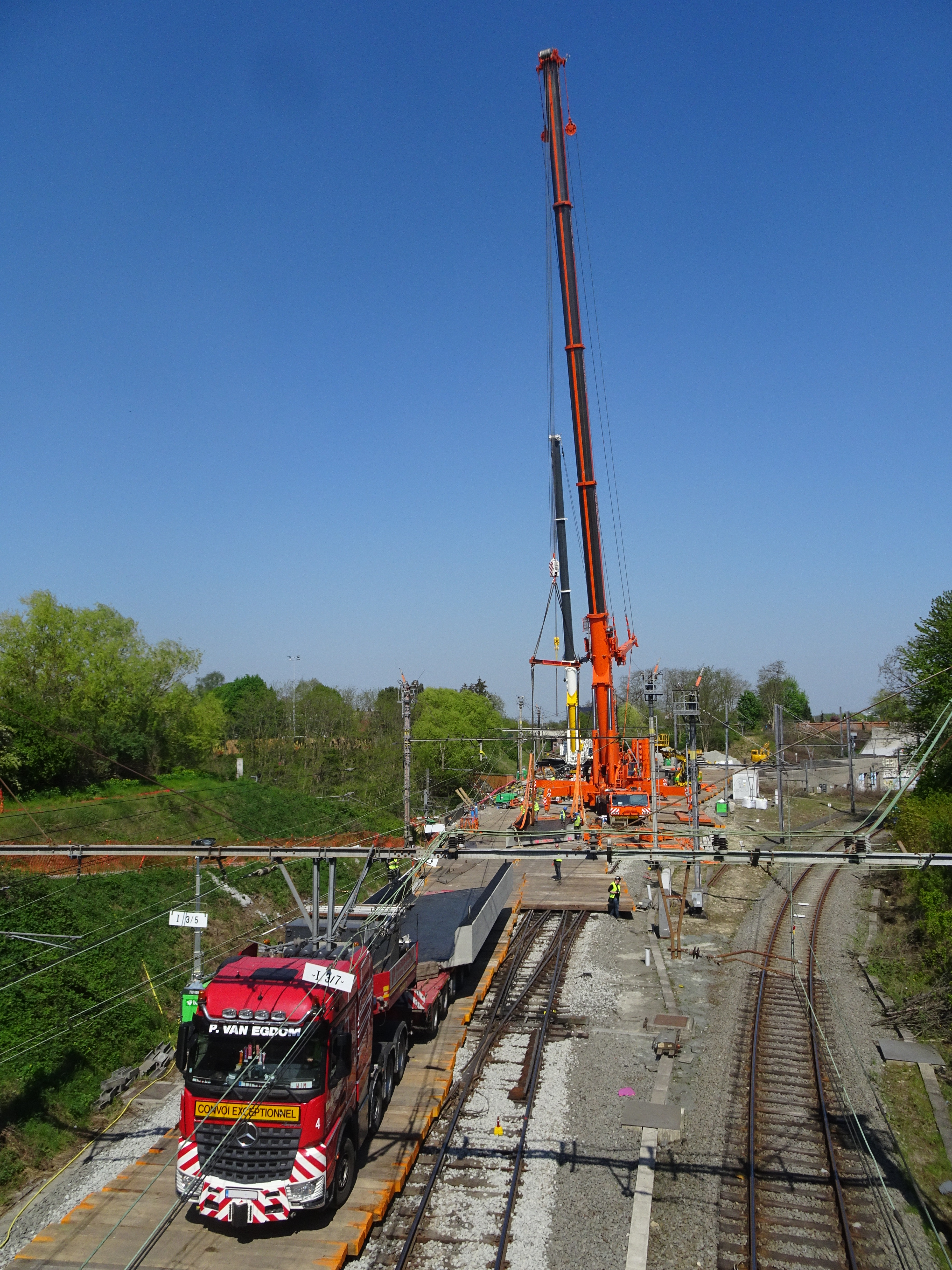 Le nouveau pont de Haren est acheminé par camion.